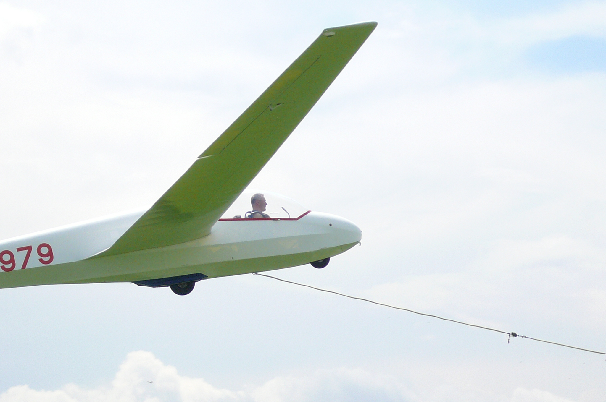 Segelfliegen in Hildesheim:„First Take Off“ – Die ASK 13 „Delta 79“ mit Matthias Heine am Steuerknüppel bei ihrem ersten Start